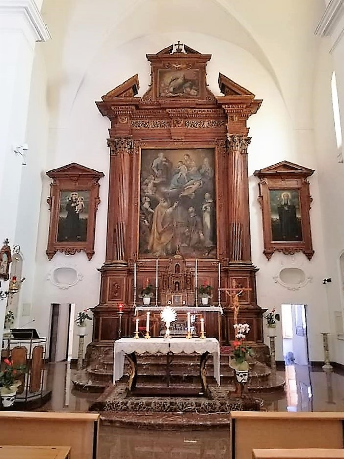 Altare maggiore.